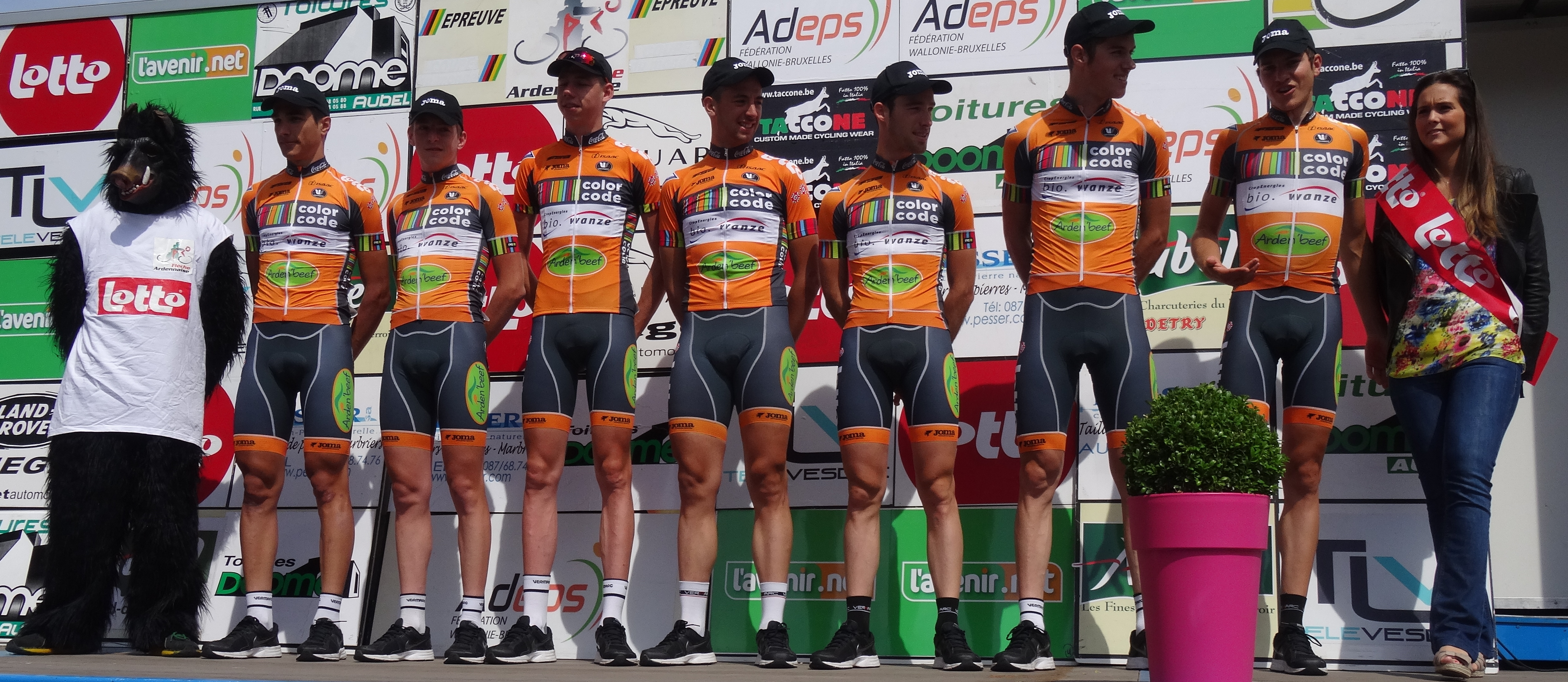 Reportage photographique réalisé le dimanche 22 juin à l'occasion du départ et de l'arrivée de la Flèche ardennaise 2014 à Herve, Belgique.